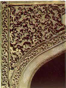 «Диван-хане». Вход в зал ротонды. Фрагмент декора